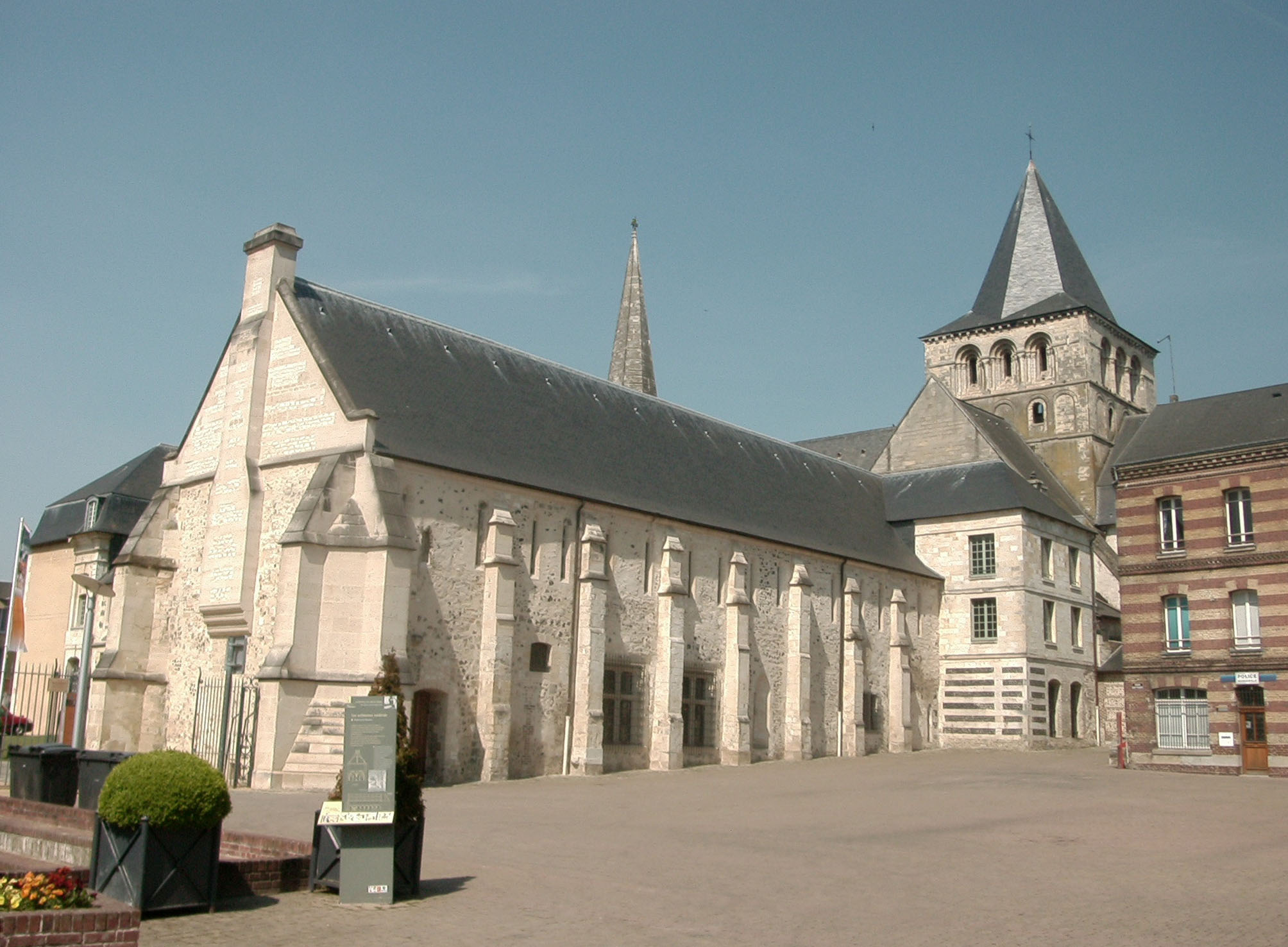 Abtei von Montivilliers Datum: 02.05.2011 Urheber: M. Pfeiffer alias Gordito1869 Quelle: privates Fotoarchiv des Urhebers